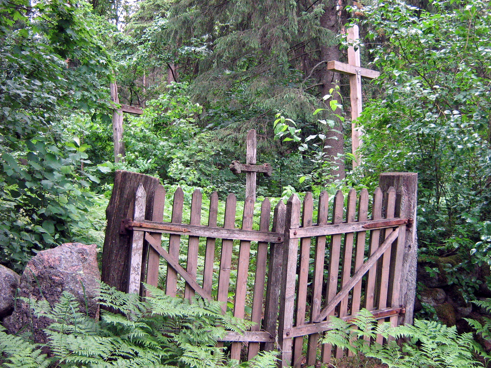 Mačiūkių kaimo kapinaitės, Plungės rajonas, Žemaitijos nacionalinio parko teritorija Foto: Algirdas, 2007 m. birželio 15 d., Lietuva